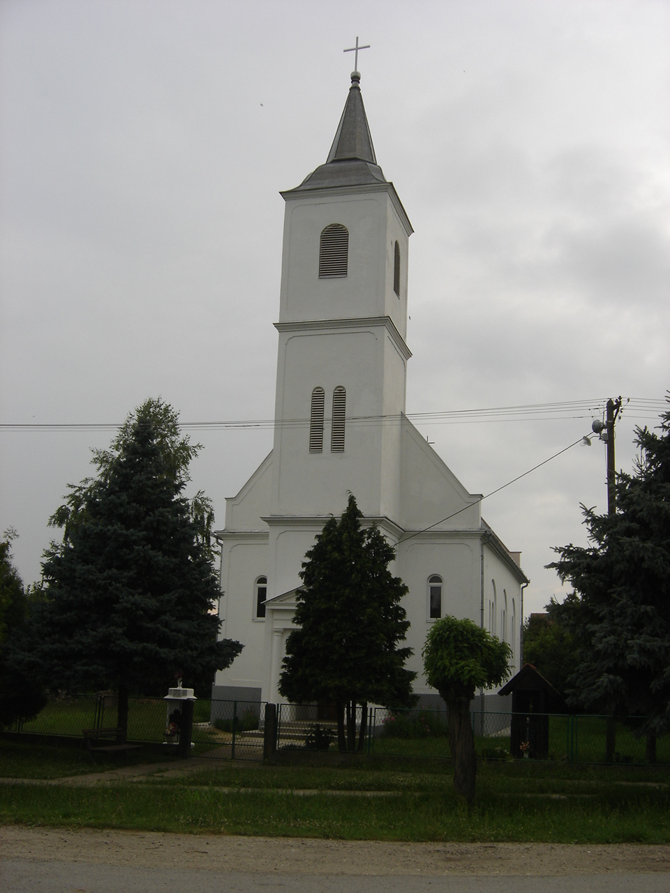 Novi Bezdan, crkva sv. Mihaela arkanđela